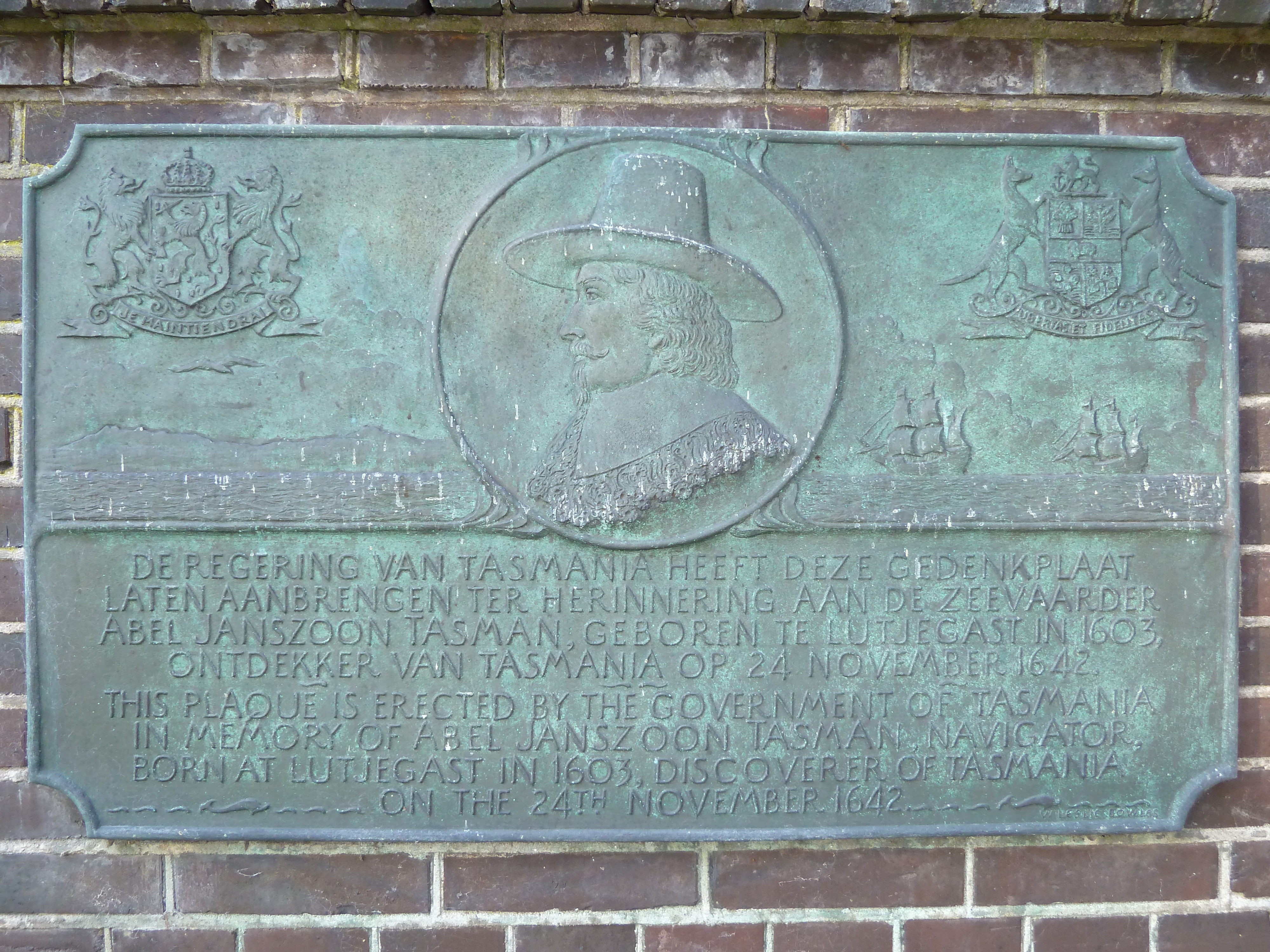 Gedenksteen in de muur van de hervormde kerk van Lutjegast (Groningen, Nederland), gewijd aan Abel Tasman (1953; onthuld door Robert Cosgrove.